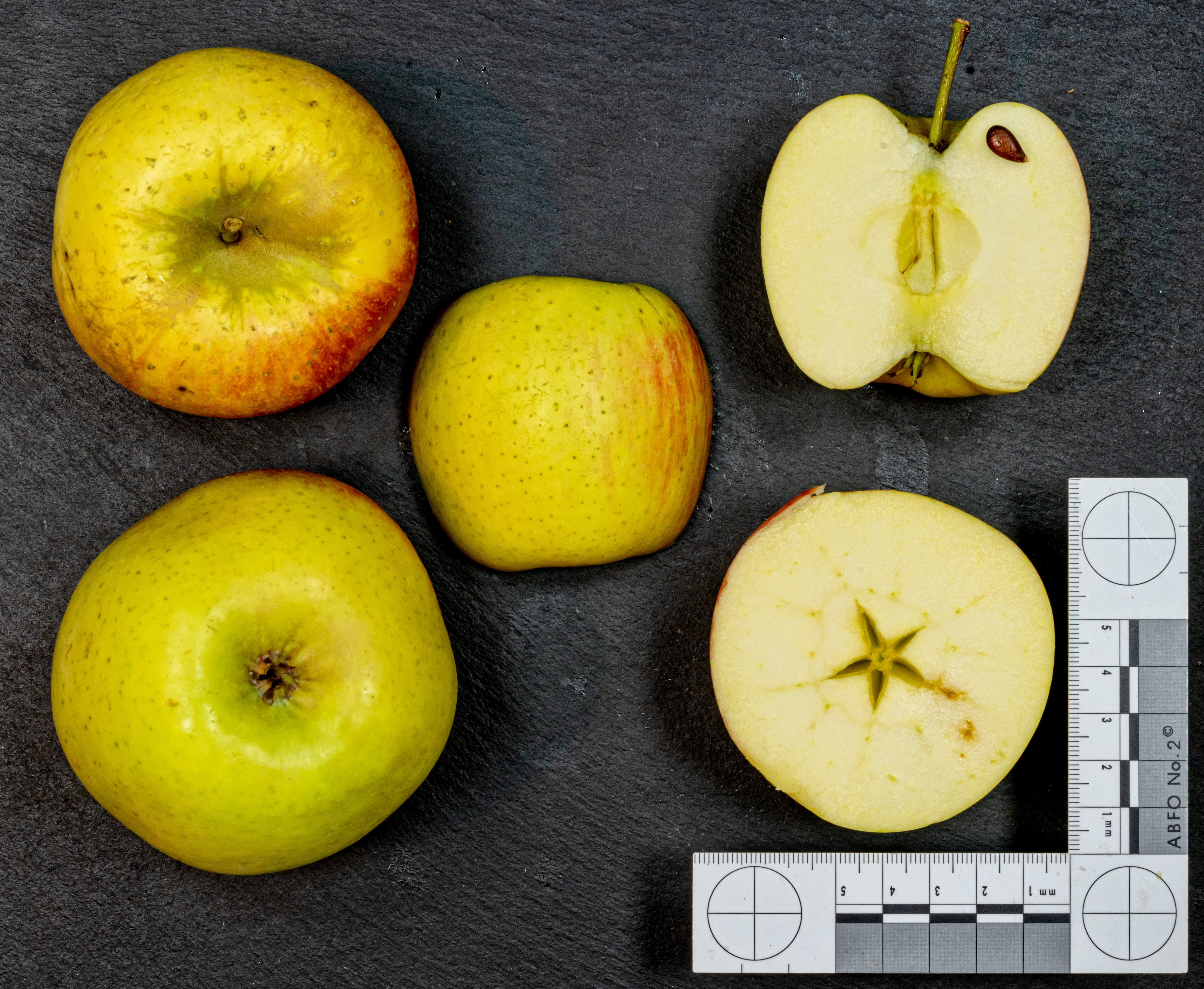 Apfelsorte: Zari Die Früchte - jeweils 5 pro Sorte - wurden mir vom Obsthof Drechsle netterweise kostenlos für die Wikipedia Photographien zur Verfügung gestellt´. Vielen Dank dafür.